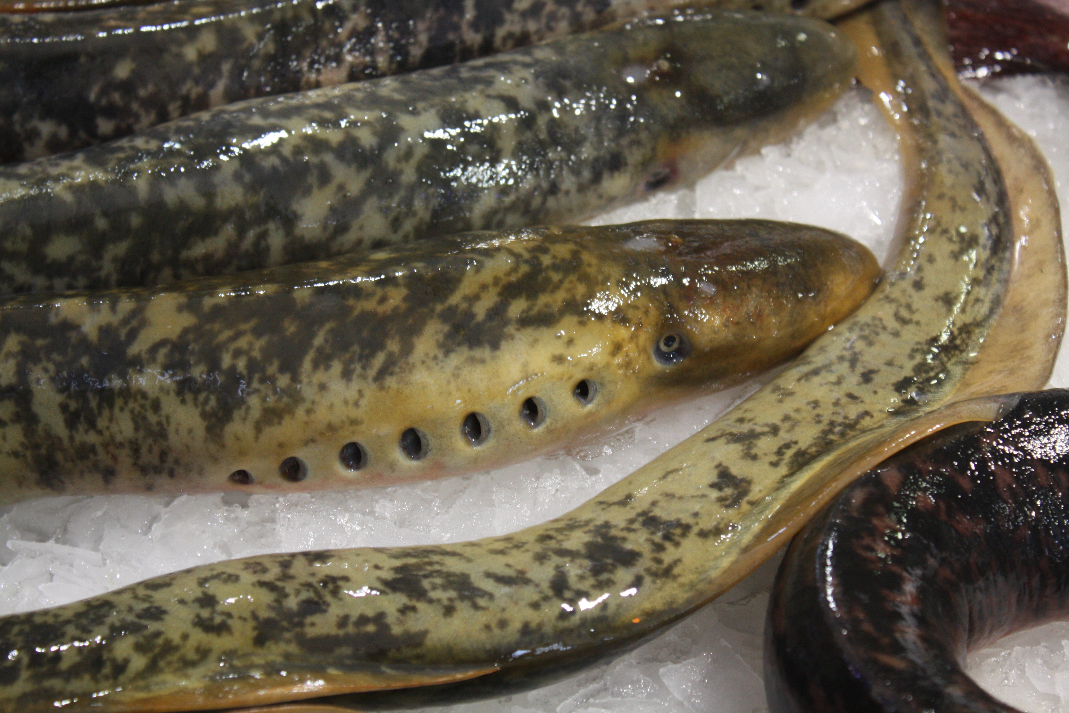 Lampreas (Petromyzon marinus) expostas á venda na praza de abastos de Santiago de Compostela. Detalle dos buratos branquiais.